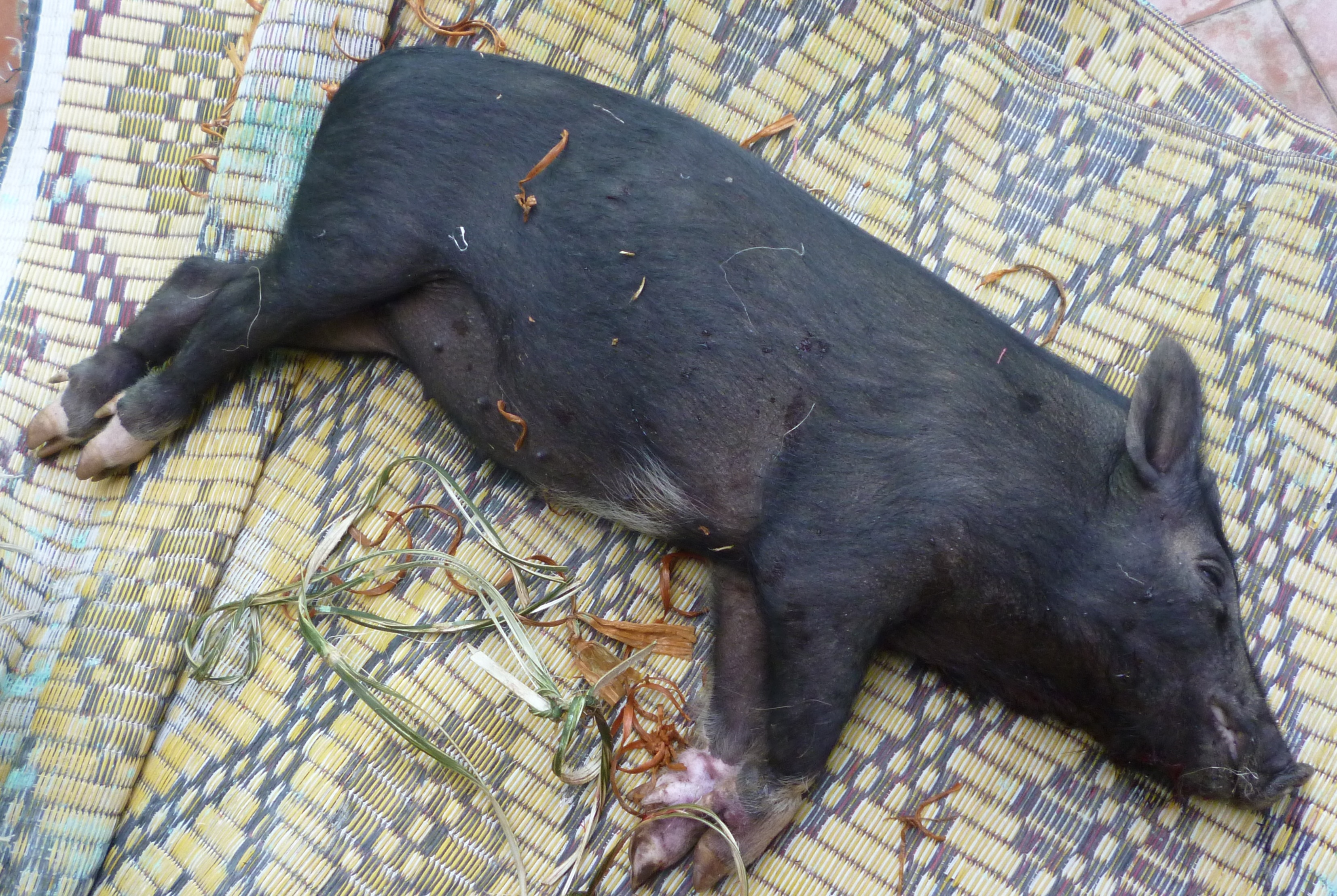 Hình chụp bằng máy ảnh cá nhân về một con heo mọi đã bị hạ